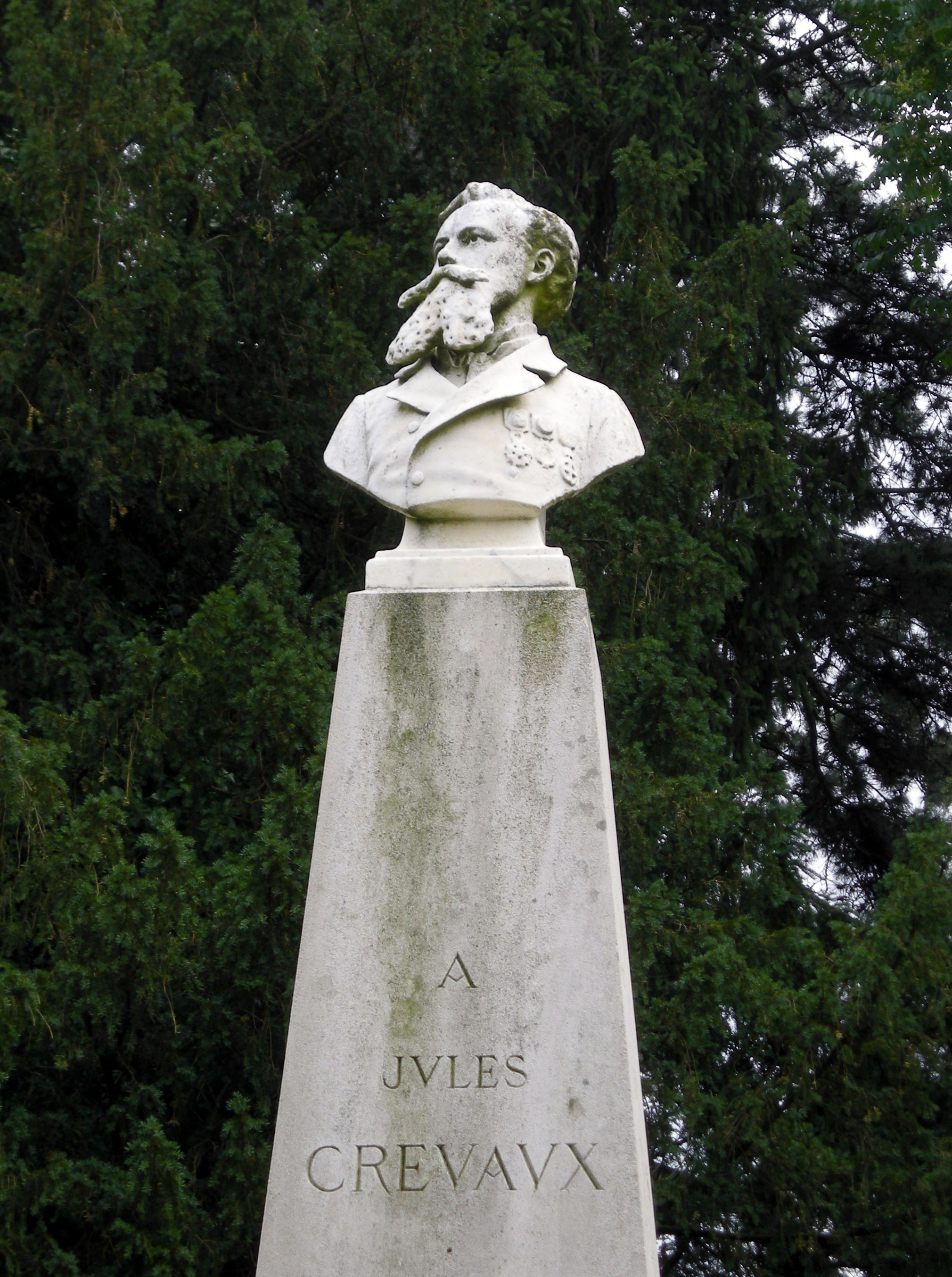 Monument dédié à Jules Crevaux, dans le Jardin Dominique Alexandre Godron à Nancy